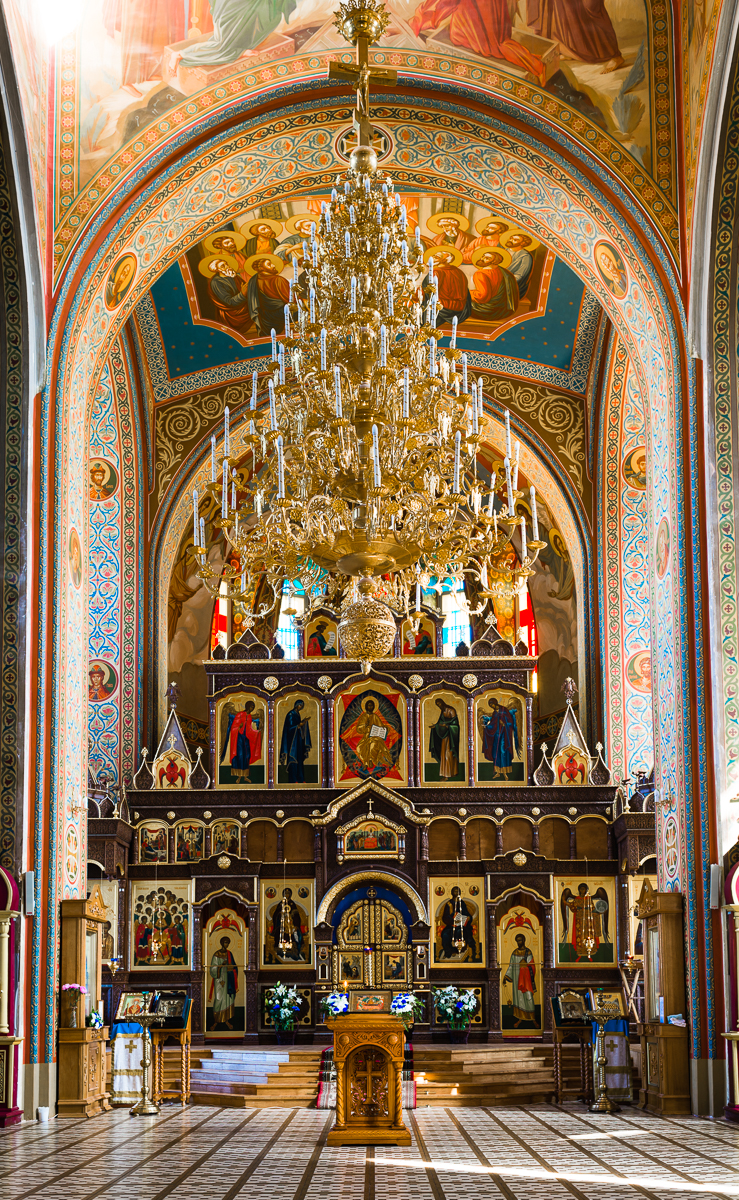 2015 год.